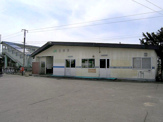 Mikawa Station in Muroran Main Line, Japan